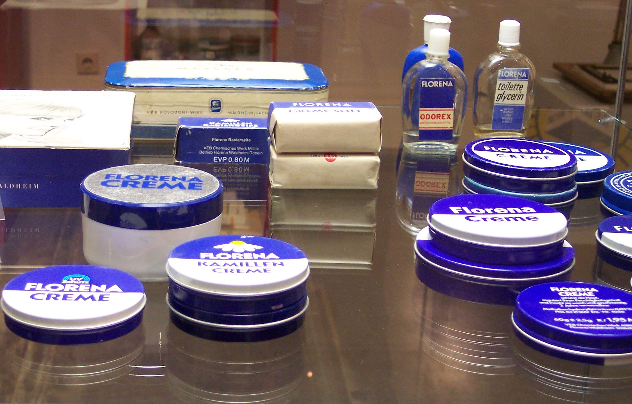 Teil des Florena-Sortiments